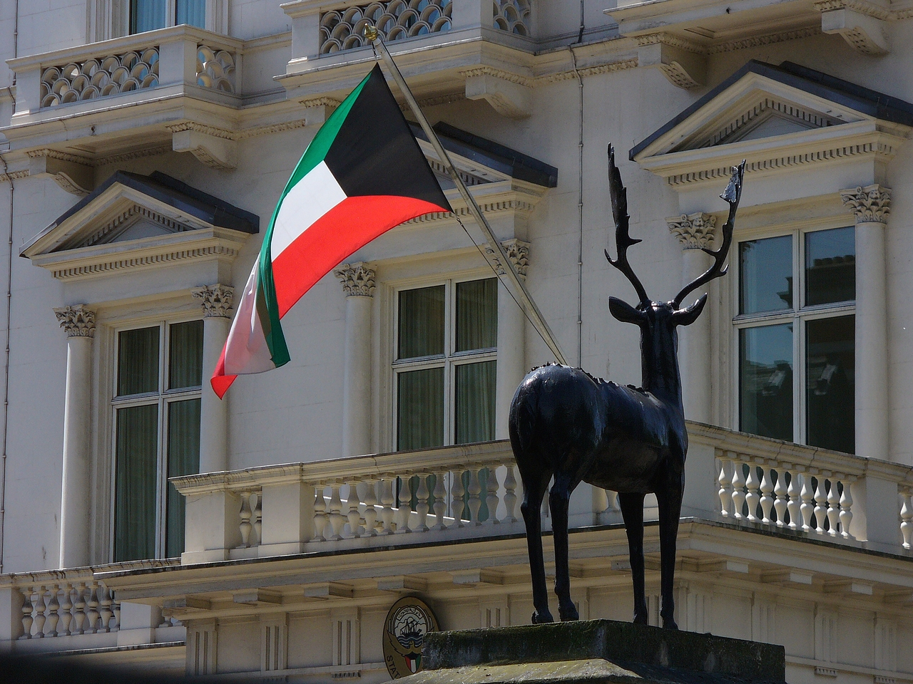 London